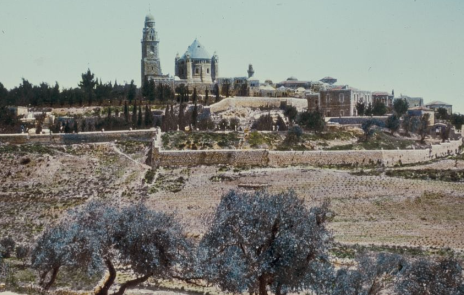 Иерусалим. Долину Еннома